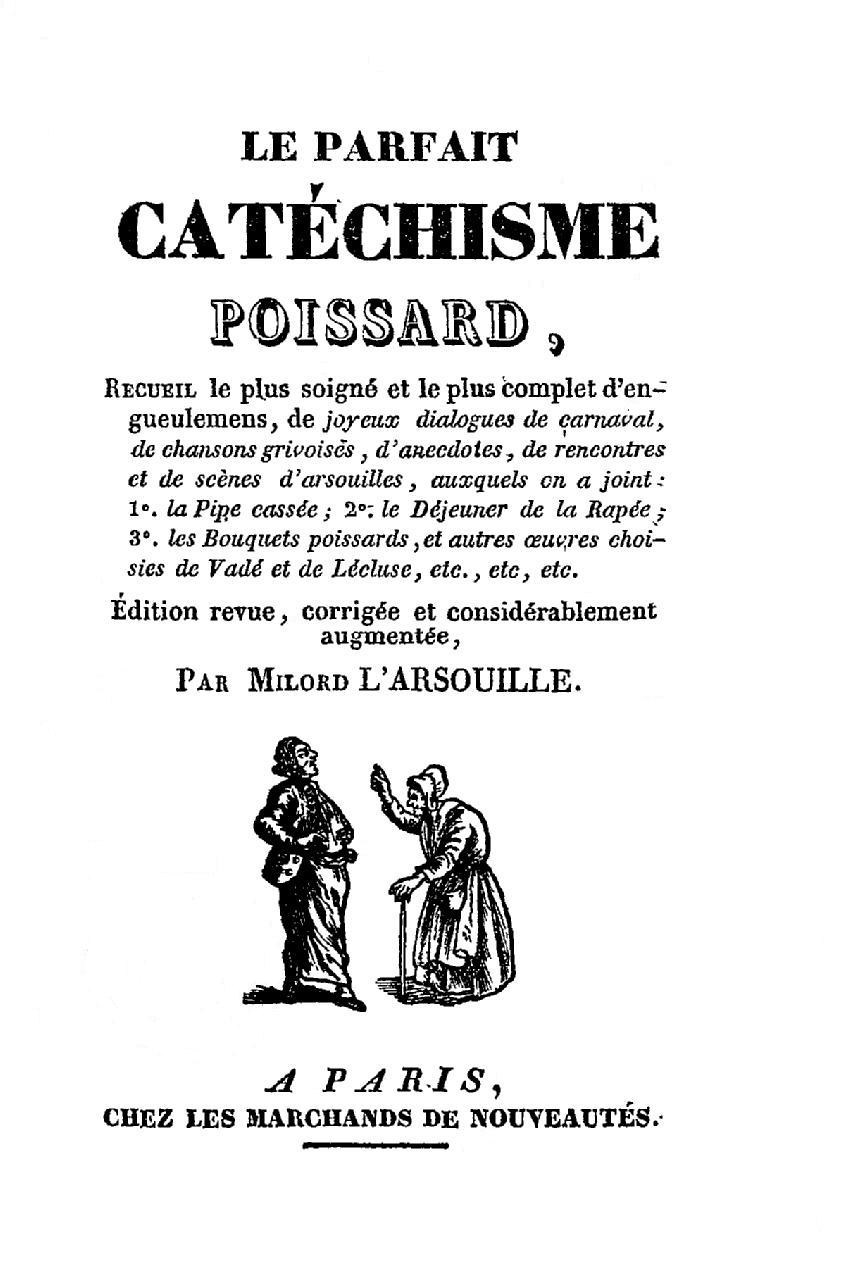 Page de titre d'un catéchisme poissard imprimé à Lille et diffusé à Lille, Paris...